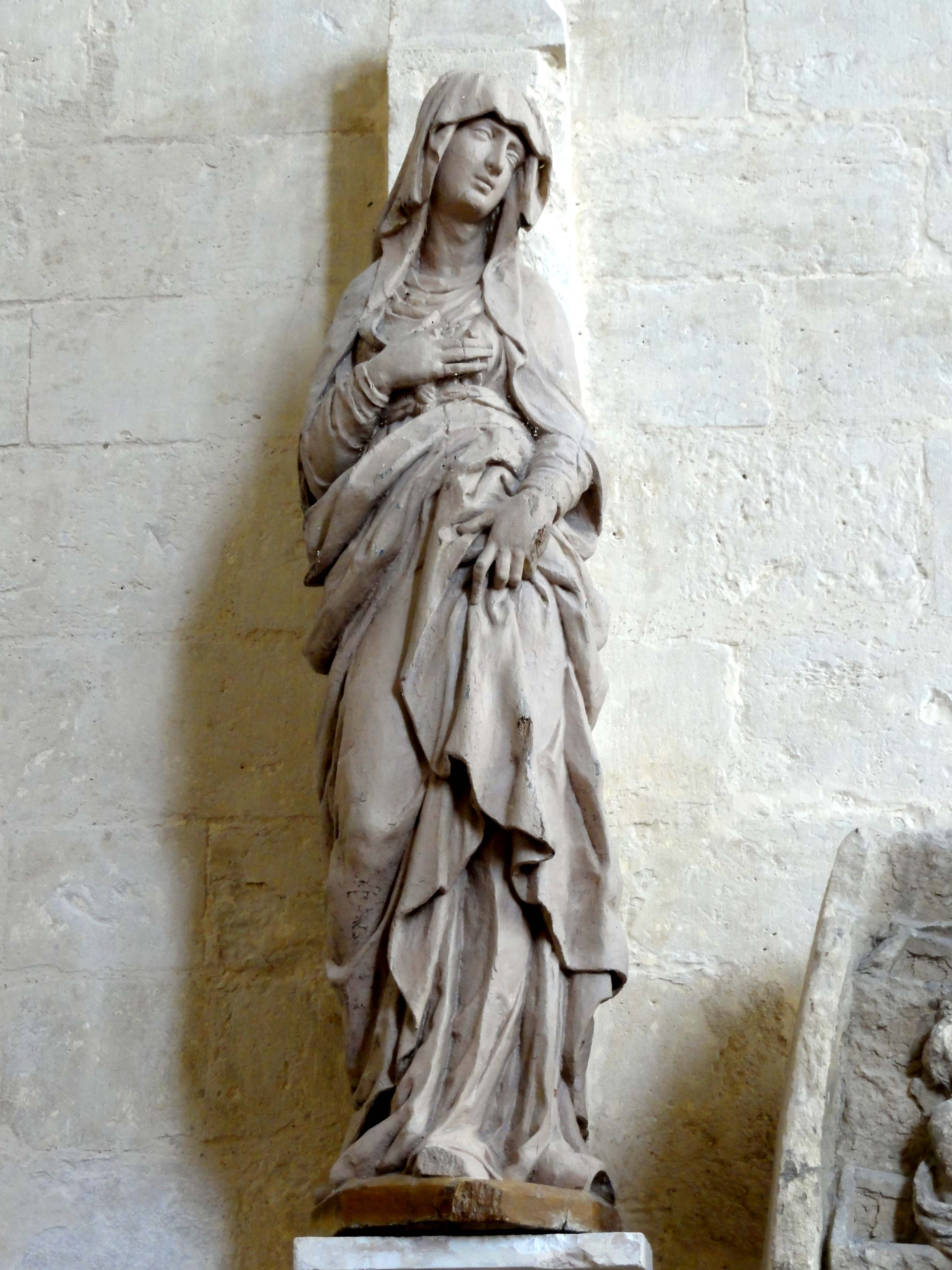 Mobilier de la basilique Saint-Mathurin de Larchant - voir titre.